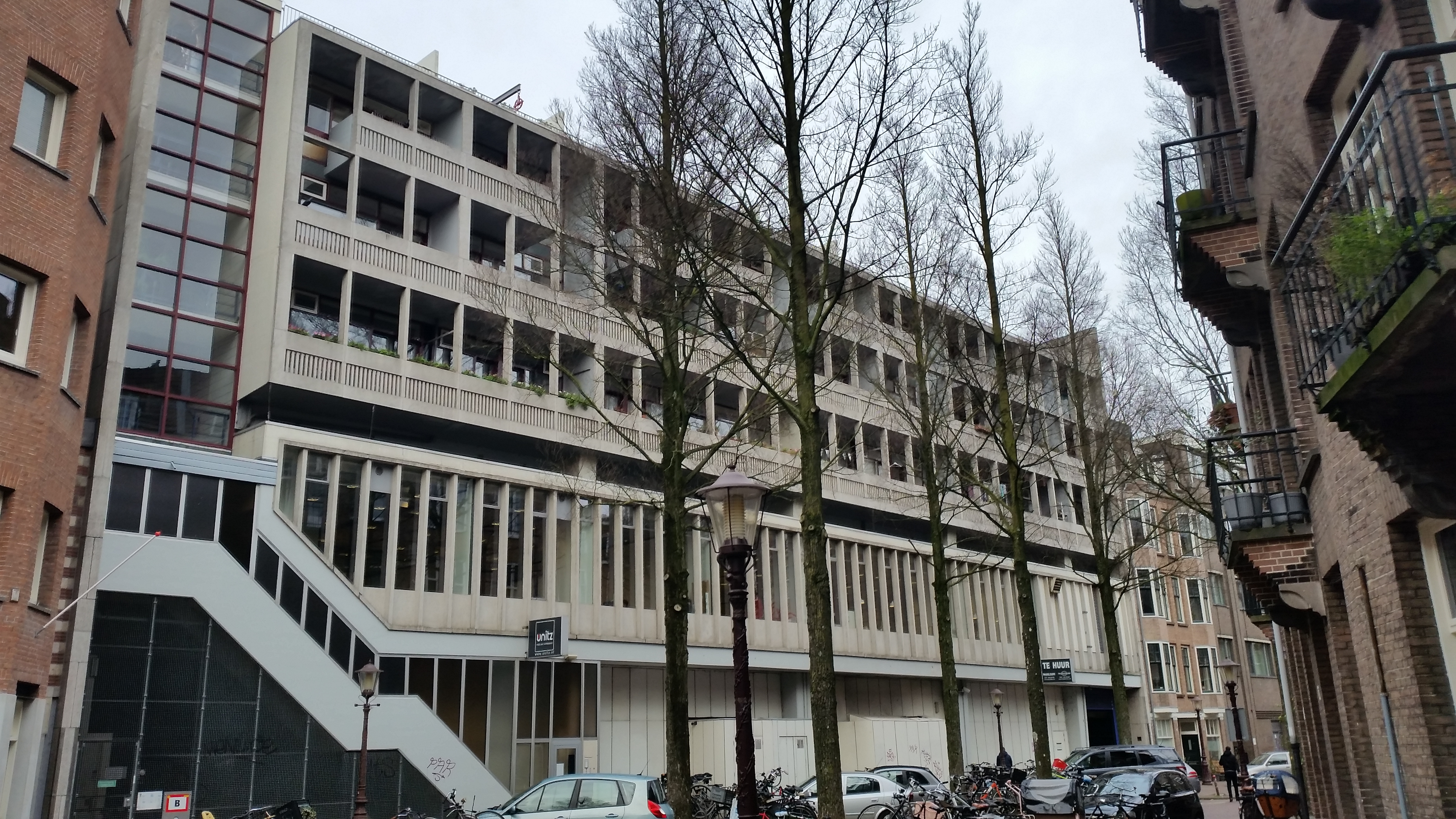 Zocherstraat 42 achtergevel van Overtoom 527-545, Amsterdam